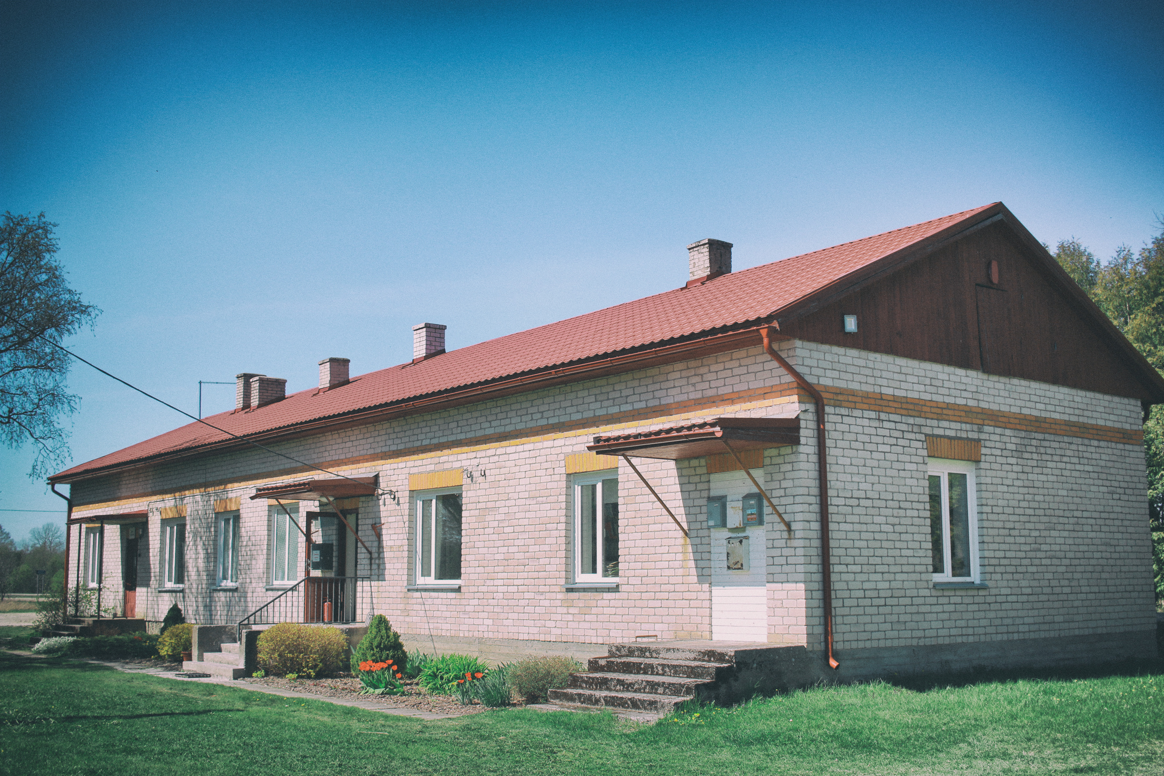 Uue-Lõve mõisa hobupostijaama hoone, kus asub Sakla raamatukogu, käsitöötuba ja perearsti vastuvõtt. Endine kolhoosikontor.